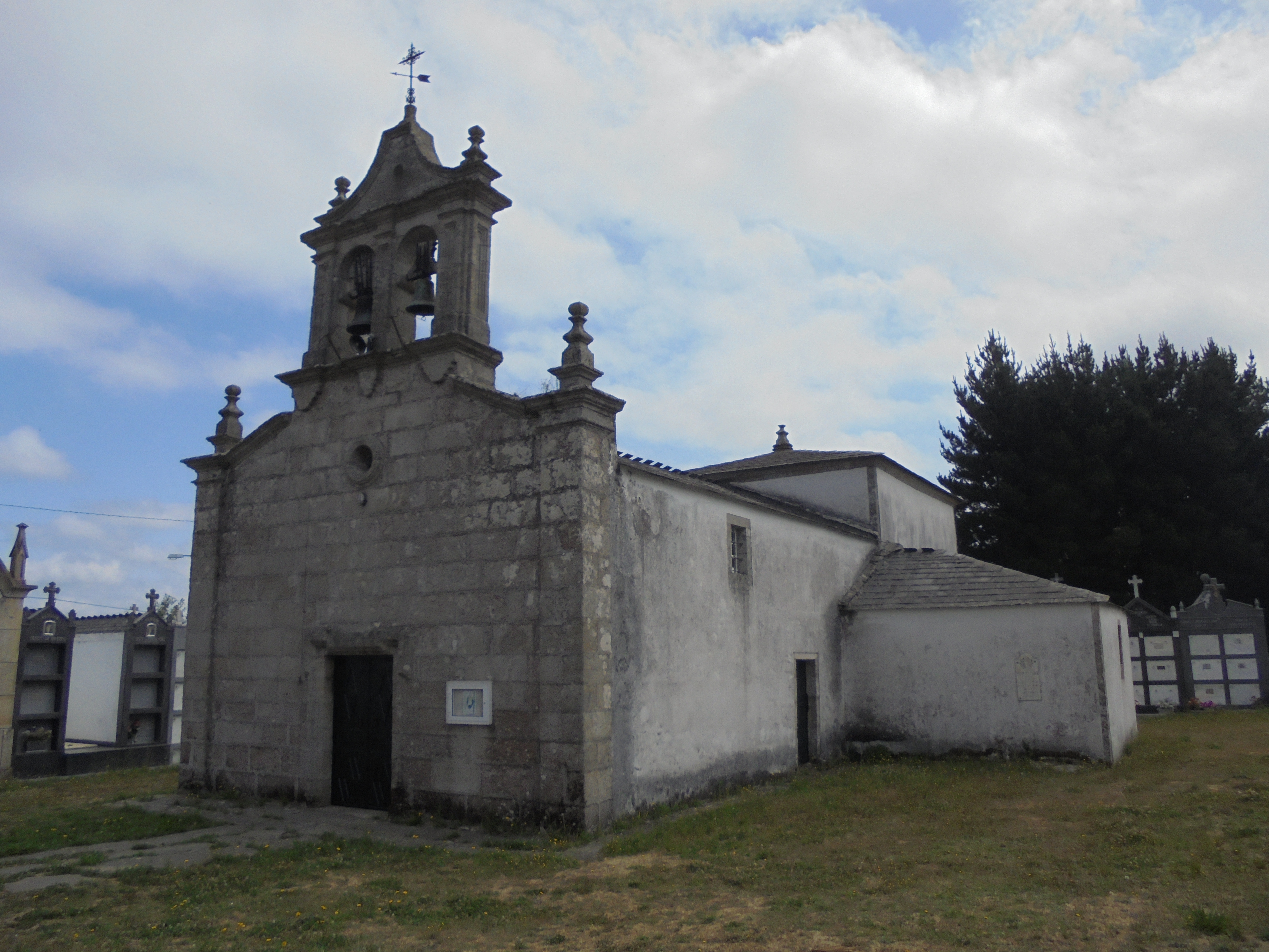 Igrexa parroquial San Pedro de Soñar ( Lugo)